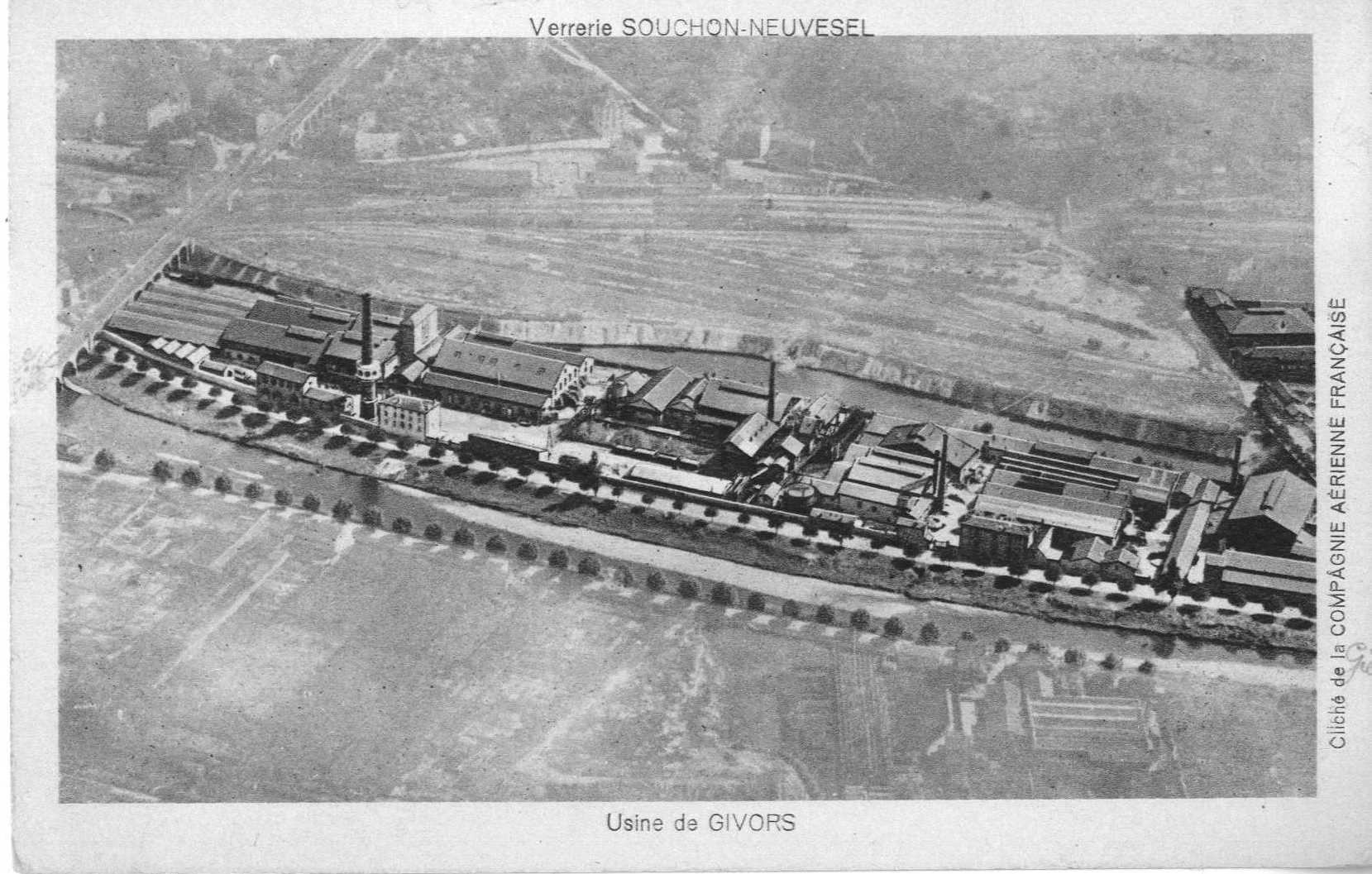 La verrerie Souchon -Neuvesel, Givors. Archives municipales de Givors, cote 5Fi 1798